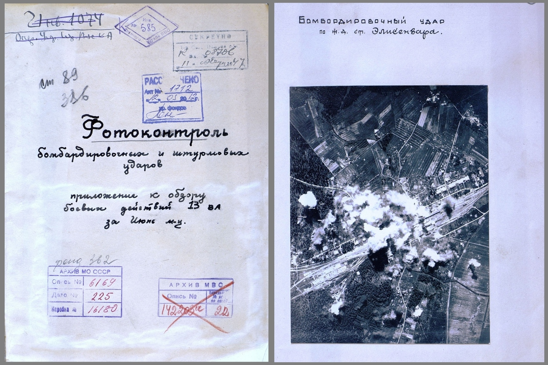 Элисенваара